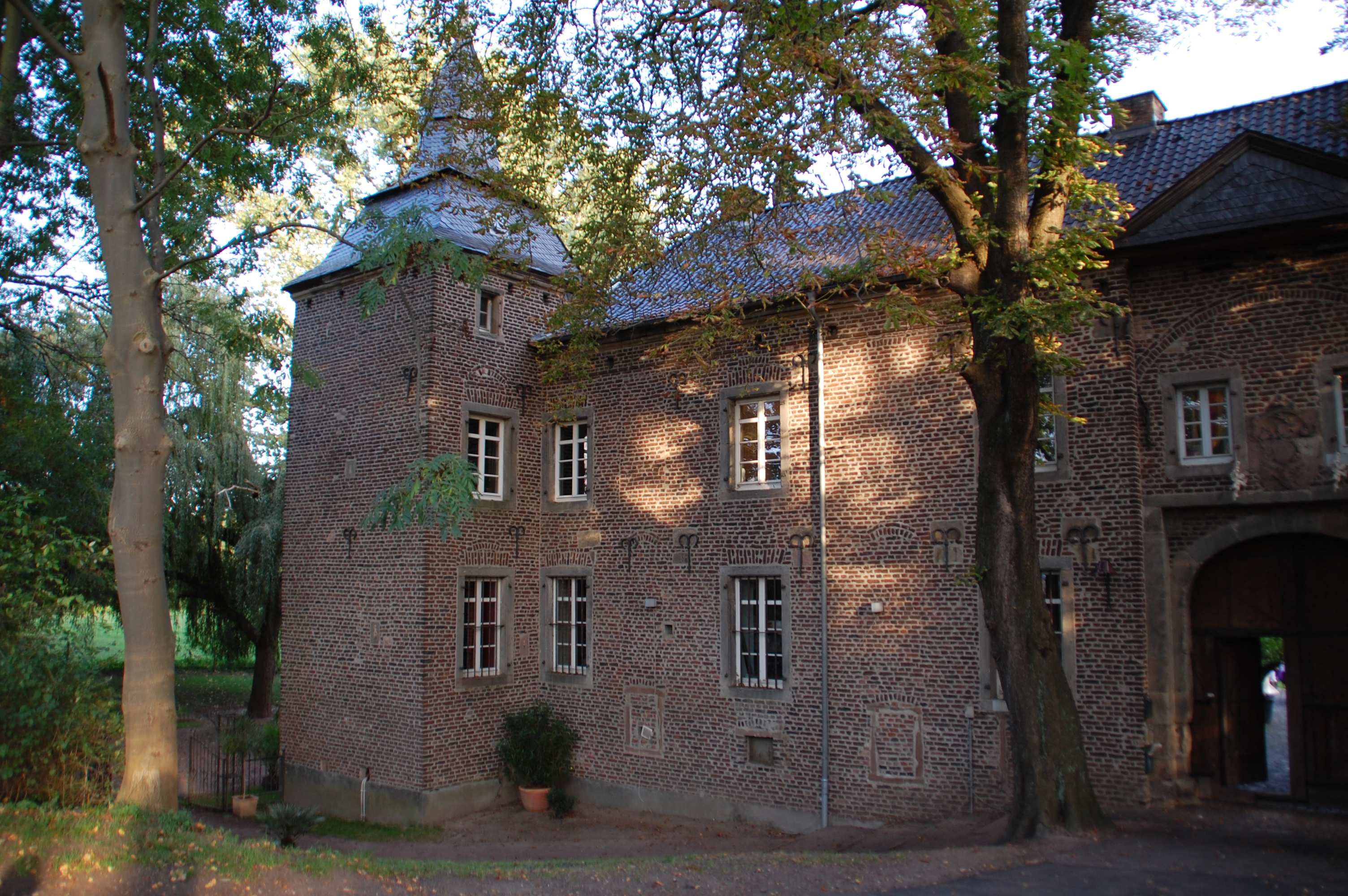 Kommandeursburg in Blatzheim, Kerpen This is a photograph of an architectural monument.